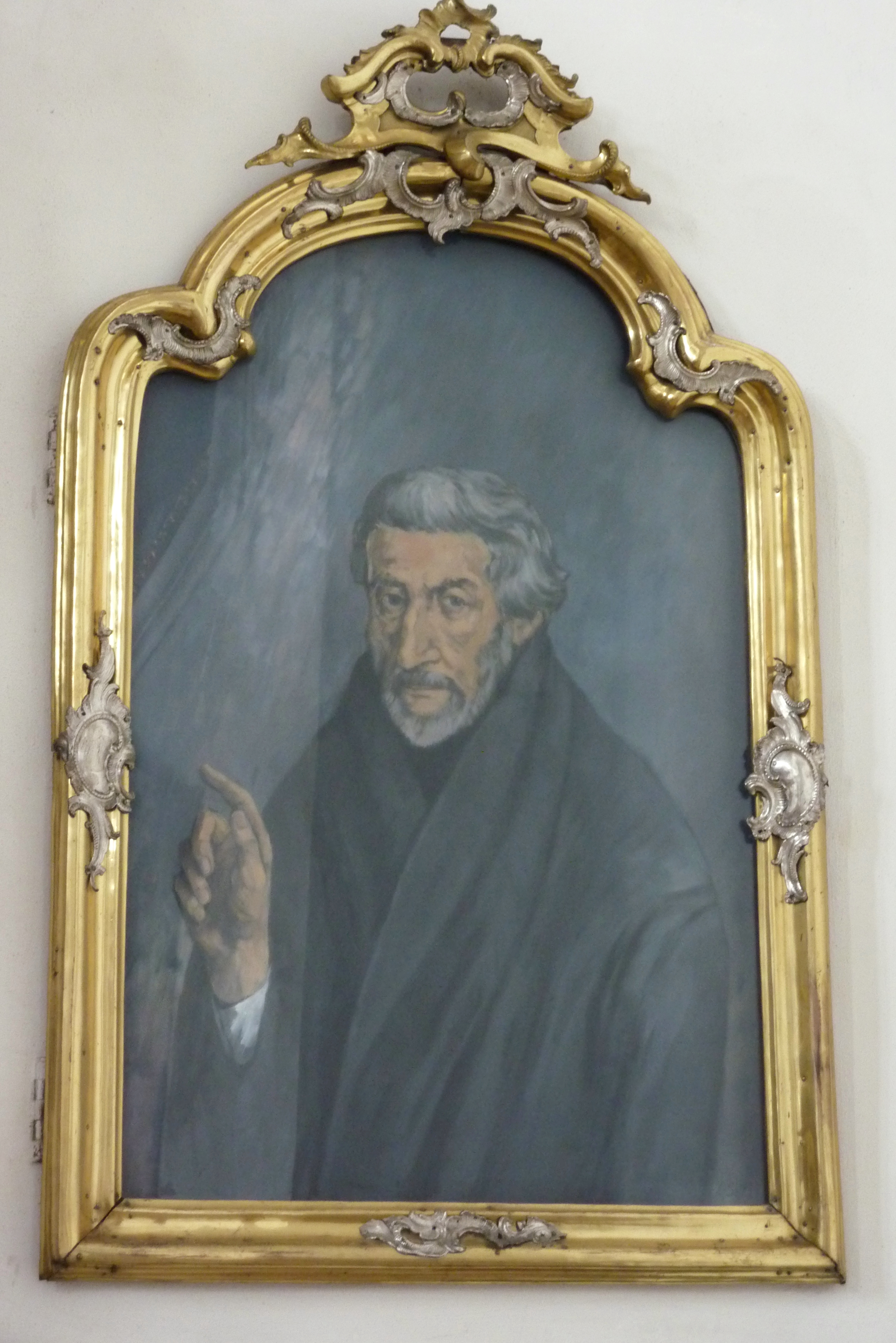 Katholische Pfarrkirche Basilika St. Peter (Dillingen) in Dillingen an der Donau (Bayern), Gemälde mit der Darstellung von Petrus Canisius